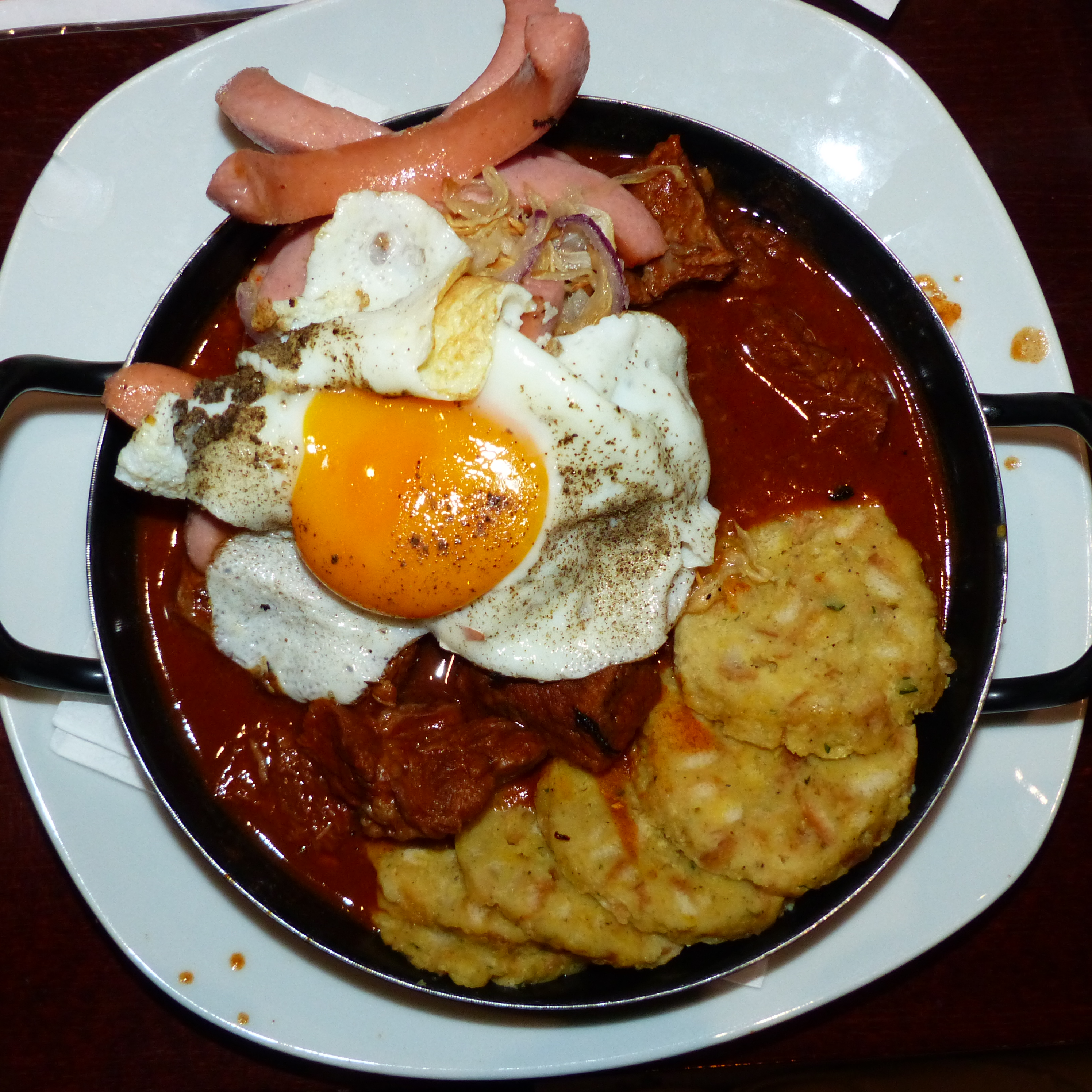 Traditionelles Wiener Fiakergulasch, Restaurant 9er Bräu, Wien